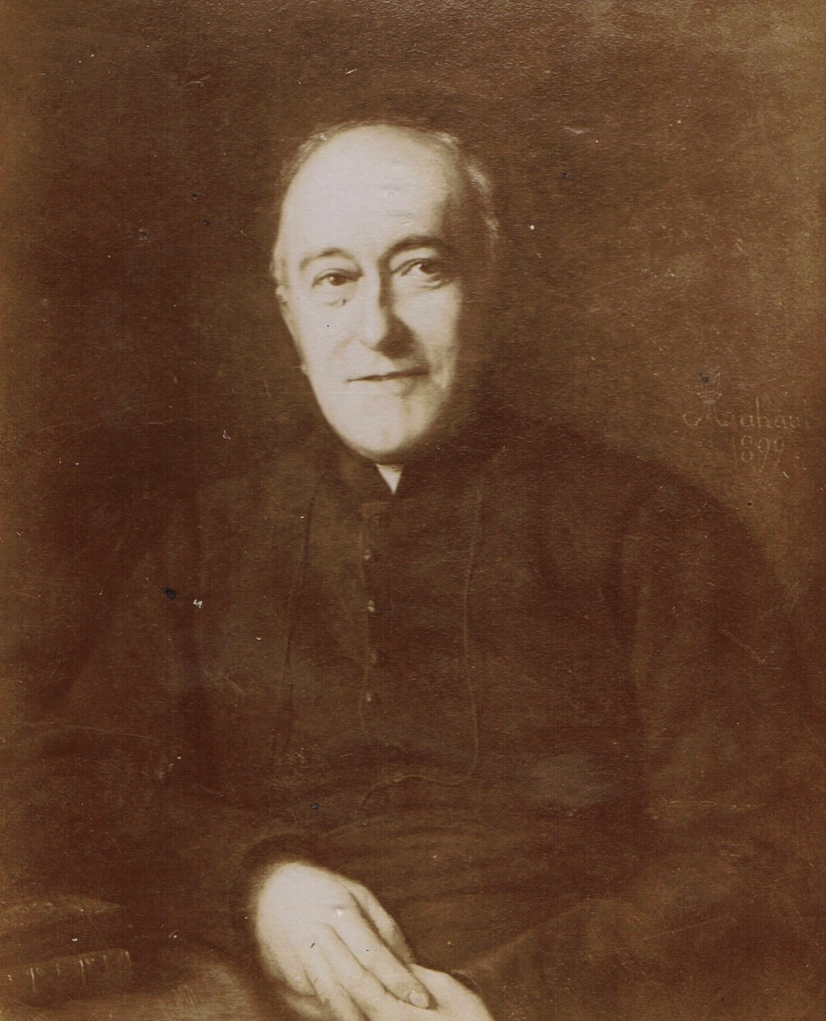 Huile représentant Louis Duchesne (1843-1922), signé Rahauts, daté de 1899. Œuvre jadis exposée au palais Farnèse, à Rome. Cliché de la collection de la famille Marie-Anne Miniac, Rennes, France